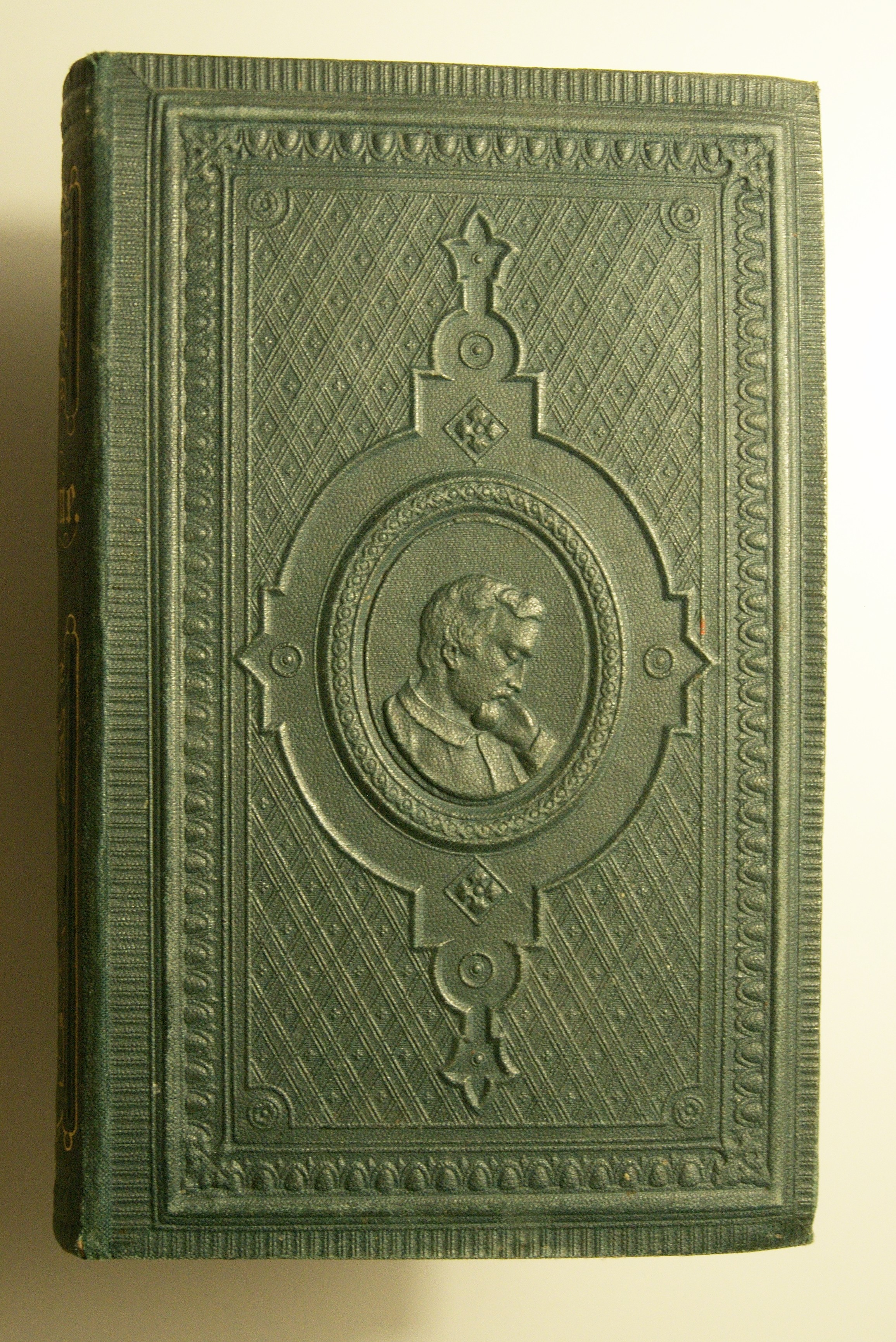 Einband der Gesamtausgabe 1867 (18 Bände, Hoffmann&Campe, Hamburg)